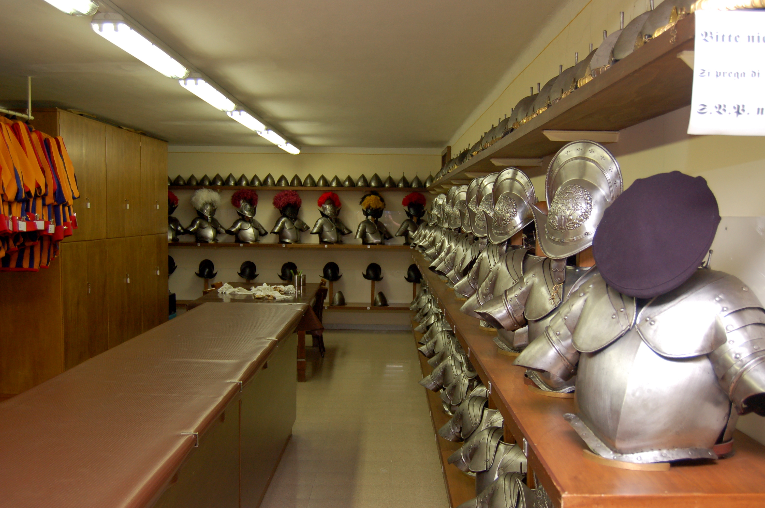 Armeria